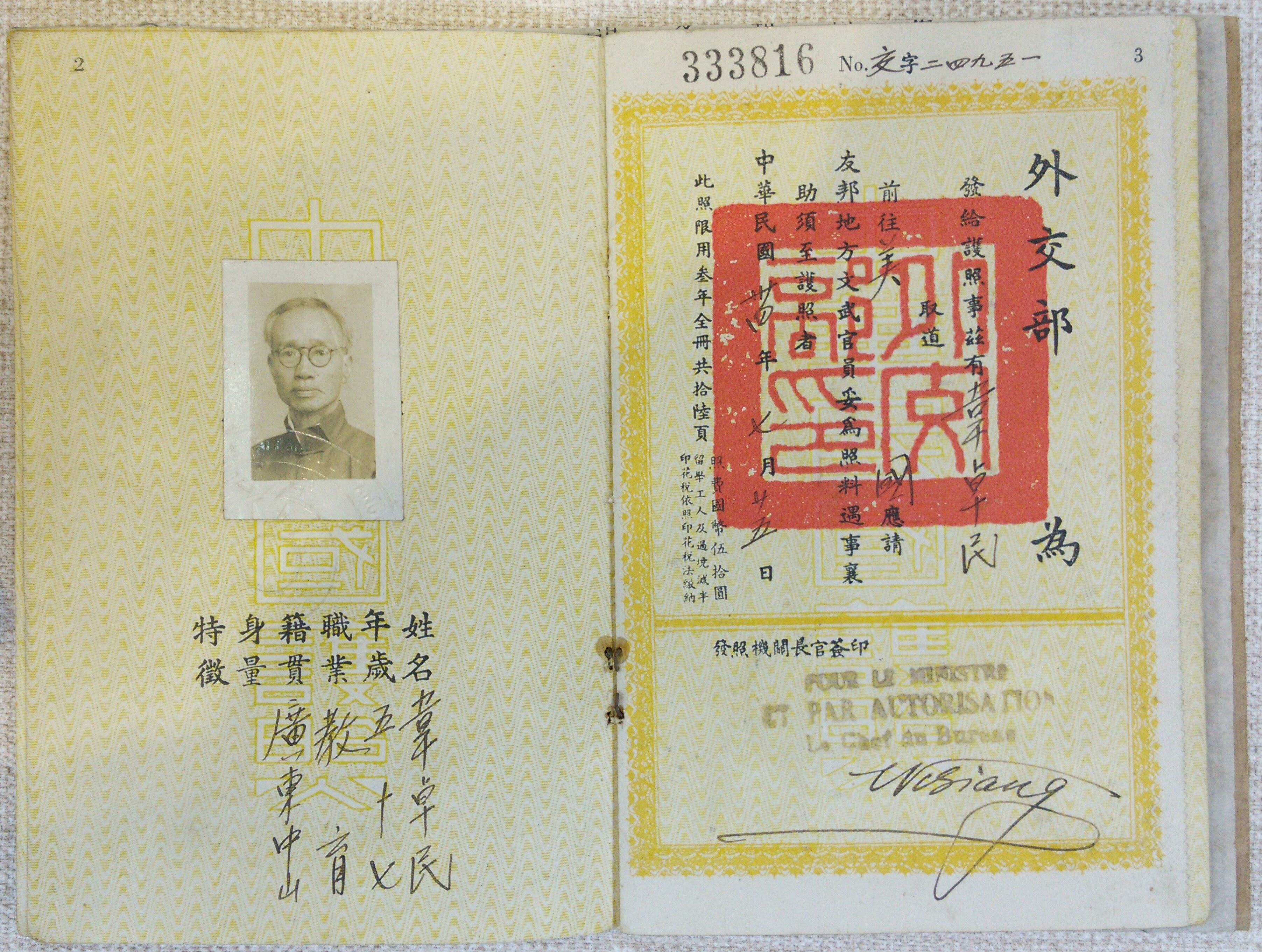 中华民国外交部颁发给华中大学校长韦卓民的护照，华中师范大学校史馆藏。